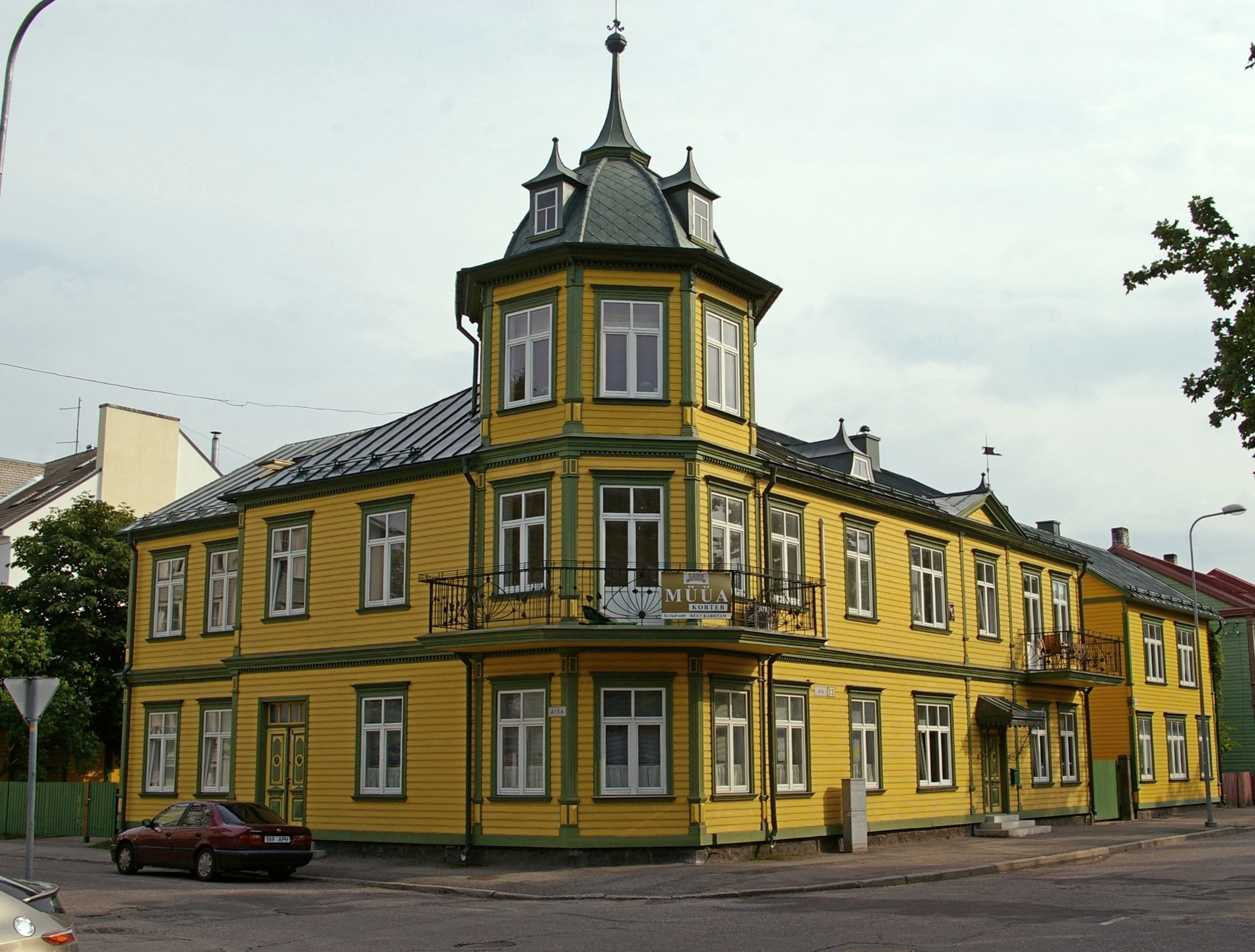 Pärnu vanalinna ja kuurordi muinsuskaitseala